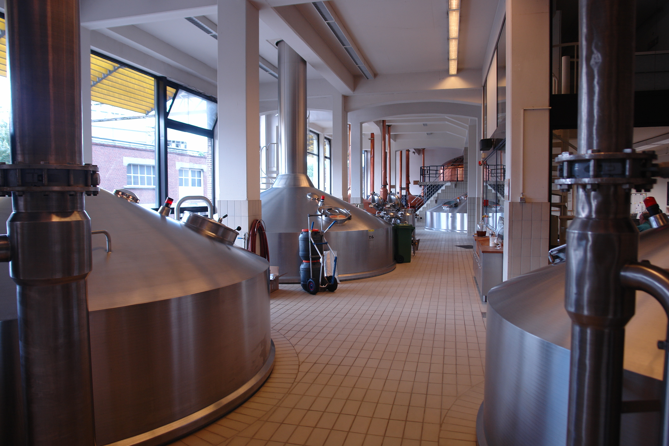 Palm Brewery (Belgium)